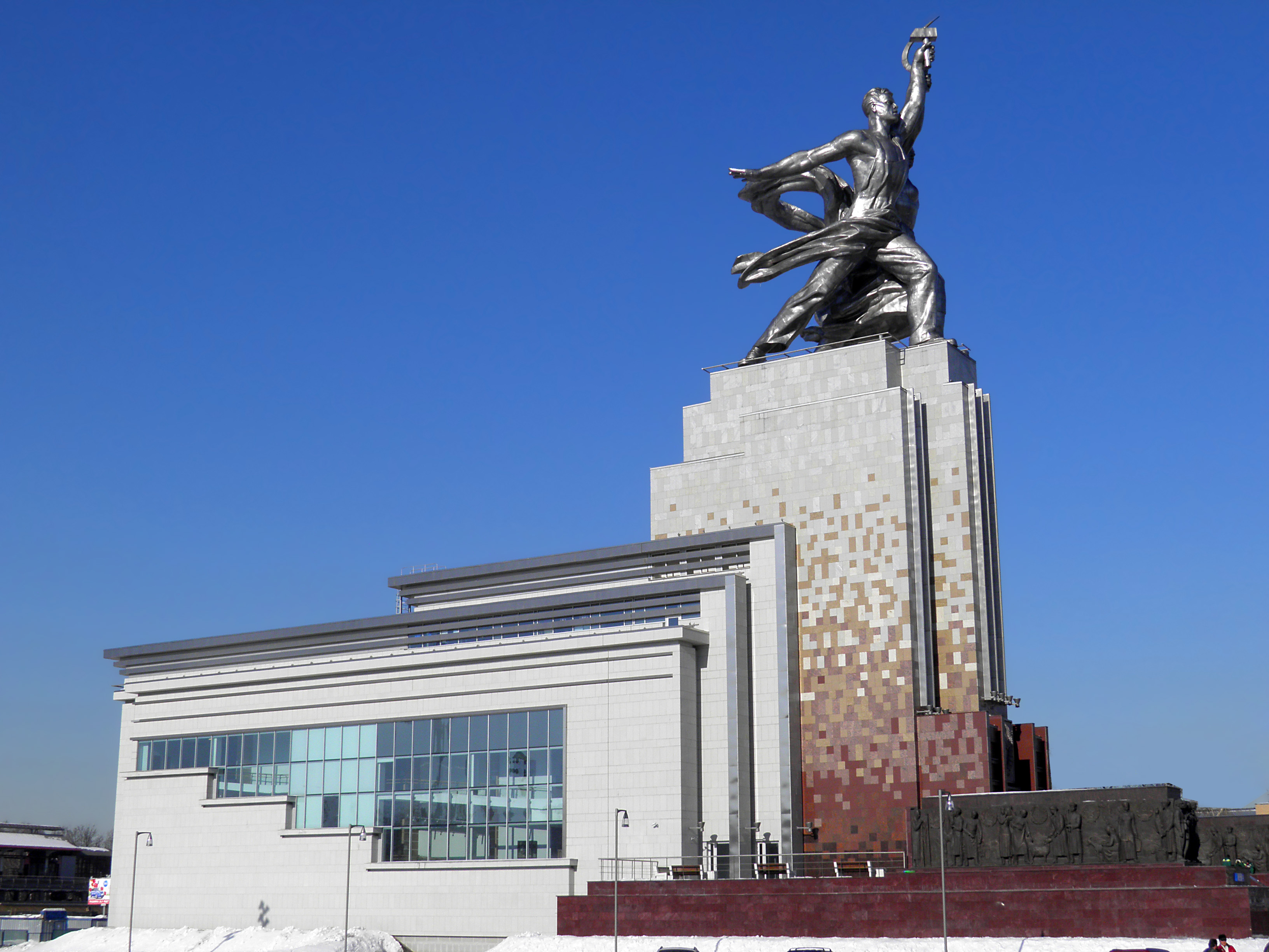 Скульптура «Рабочий и колхозница»: просп. Мира, перед северным входом на ВВЦ, Останкинский, Северо-Восточный округ, Москва